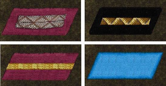 Петлицы 1945